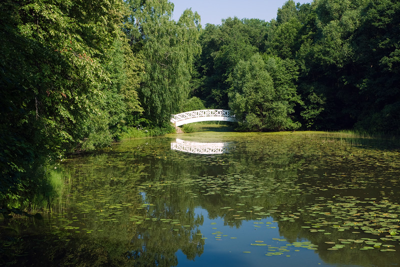 Парк (Москва и Московская область, Щербинка, село Остафьево)